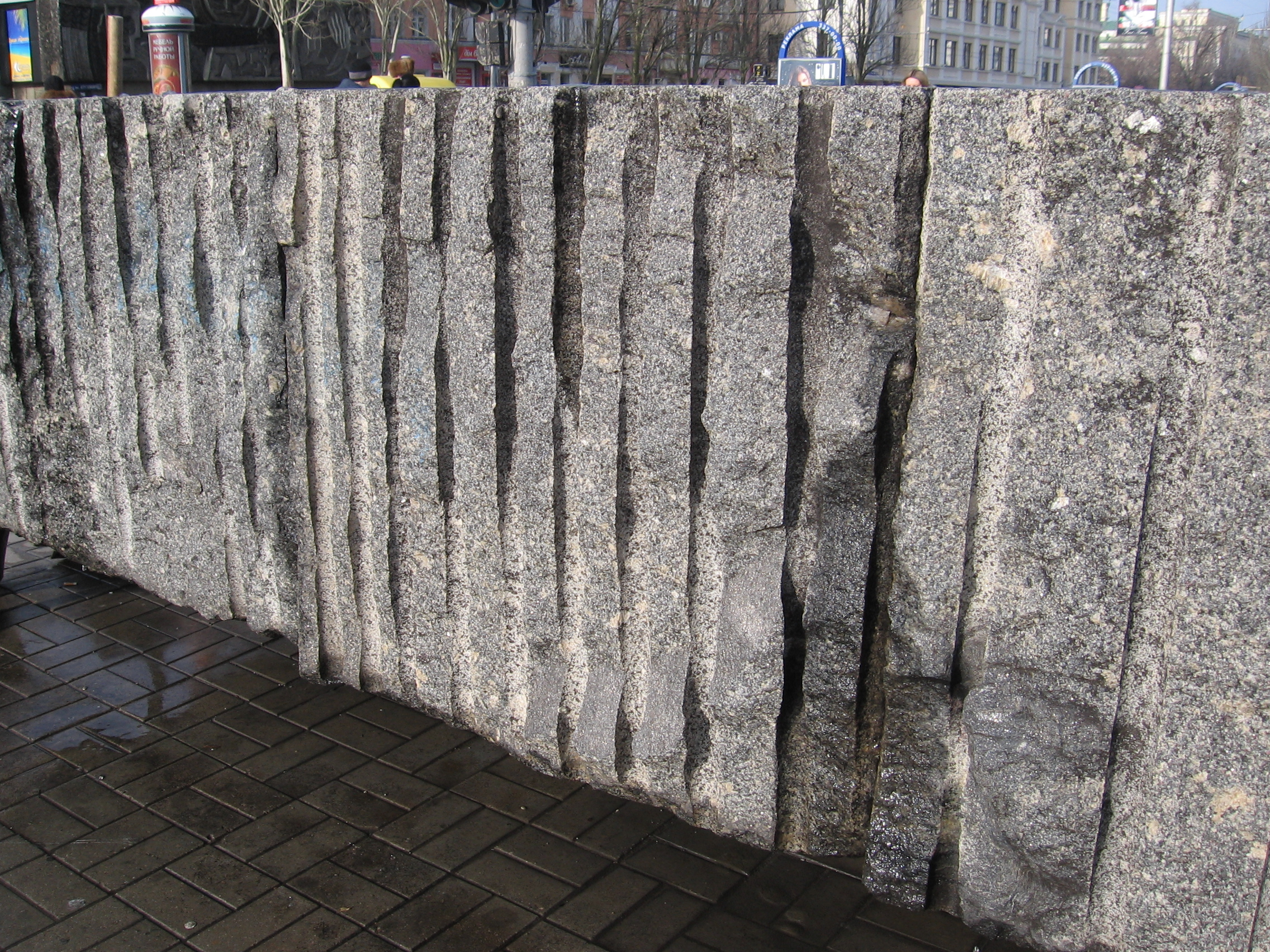 Відколювання каменю.